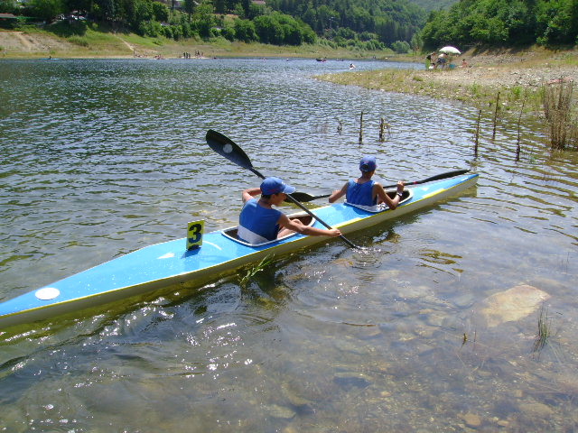 K2 :kayak biposto. Qui un k2 sul lago di Osiglia. This is a photography of Natura 2000 protected area with ID IT1323115